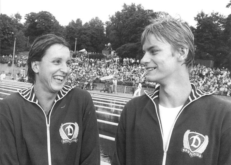 Barbara Krause, Jörg Woithe ADN-ZB Kluge 2.8.1979 Brandenburg: 30. DDR-Meisterschaften im Sportschwimmen Die beiden Schnellsten der Titelkämpfe kurz nach ihren Siegen über 100 m Freistil. Barbara Krause erreichte mit 55,71 s Jahres-Weltbestzeit und der neue titelträger bei den Herren, Jörg Woithe (beide SC Dynamo Berlin), schwamm mit 51,67 s DDR-Rekord.